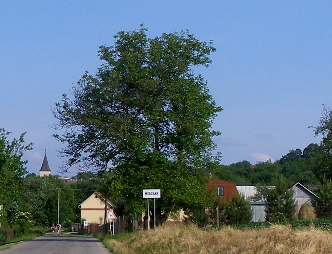 Obec Medzany okres Prešov.